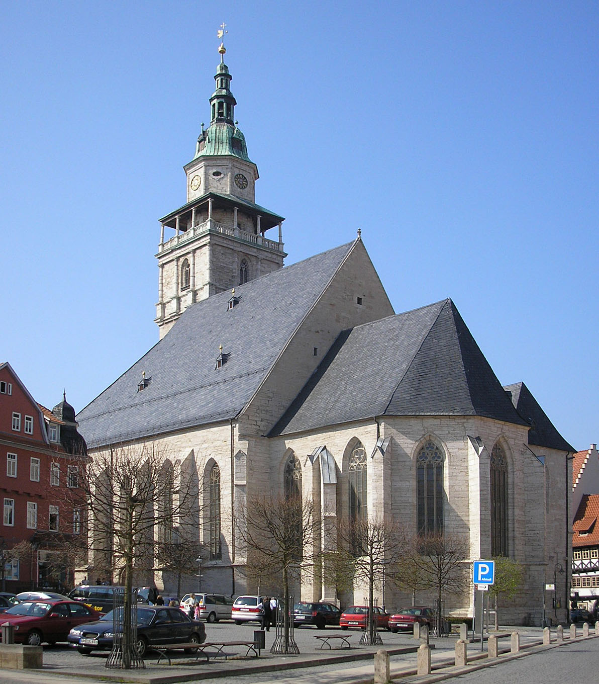 Die Marktkirche in Bad Langensalza (Thüringen).